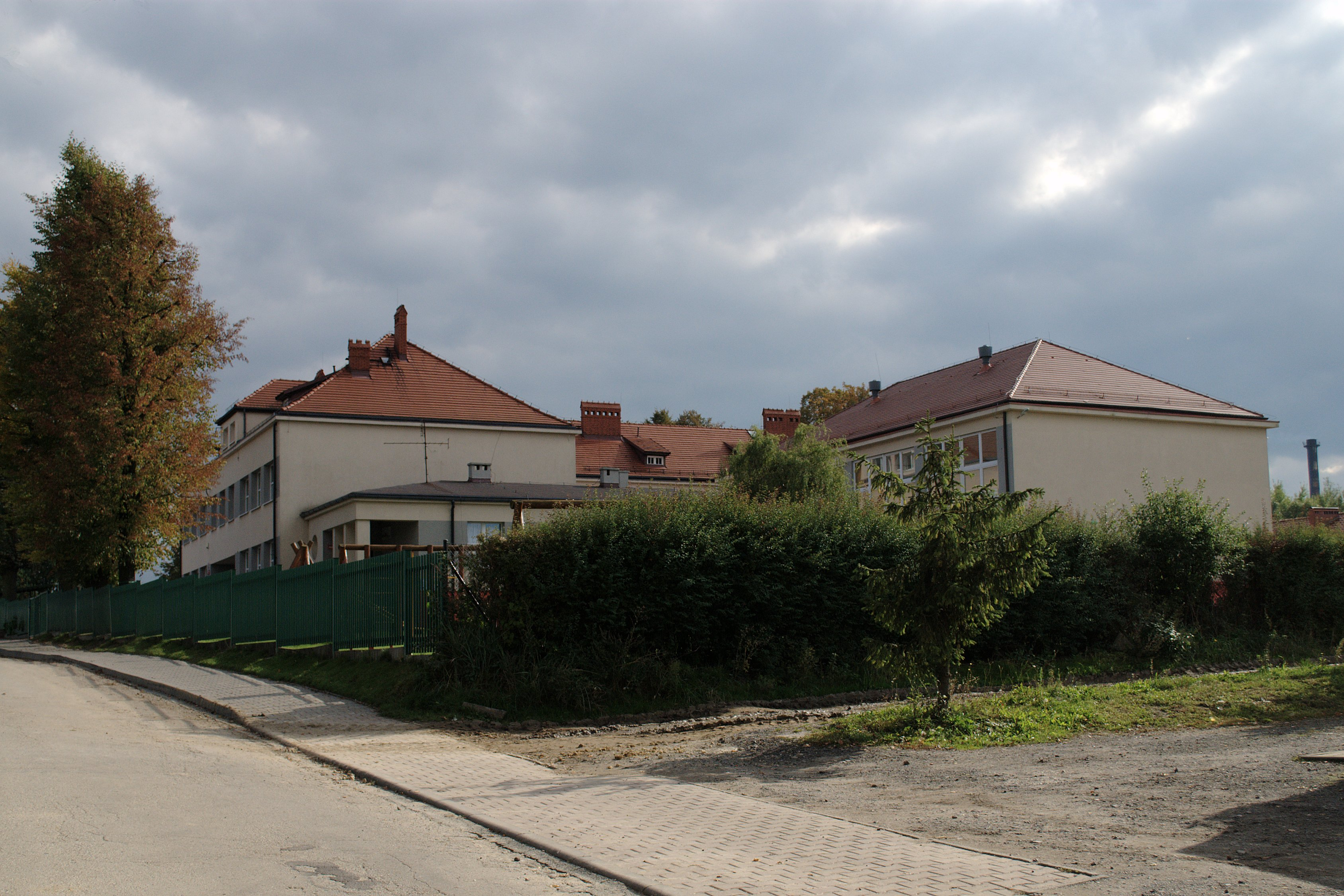 Szkoła w Sierakowicach.